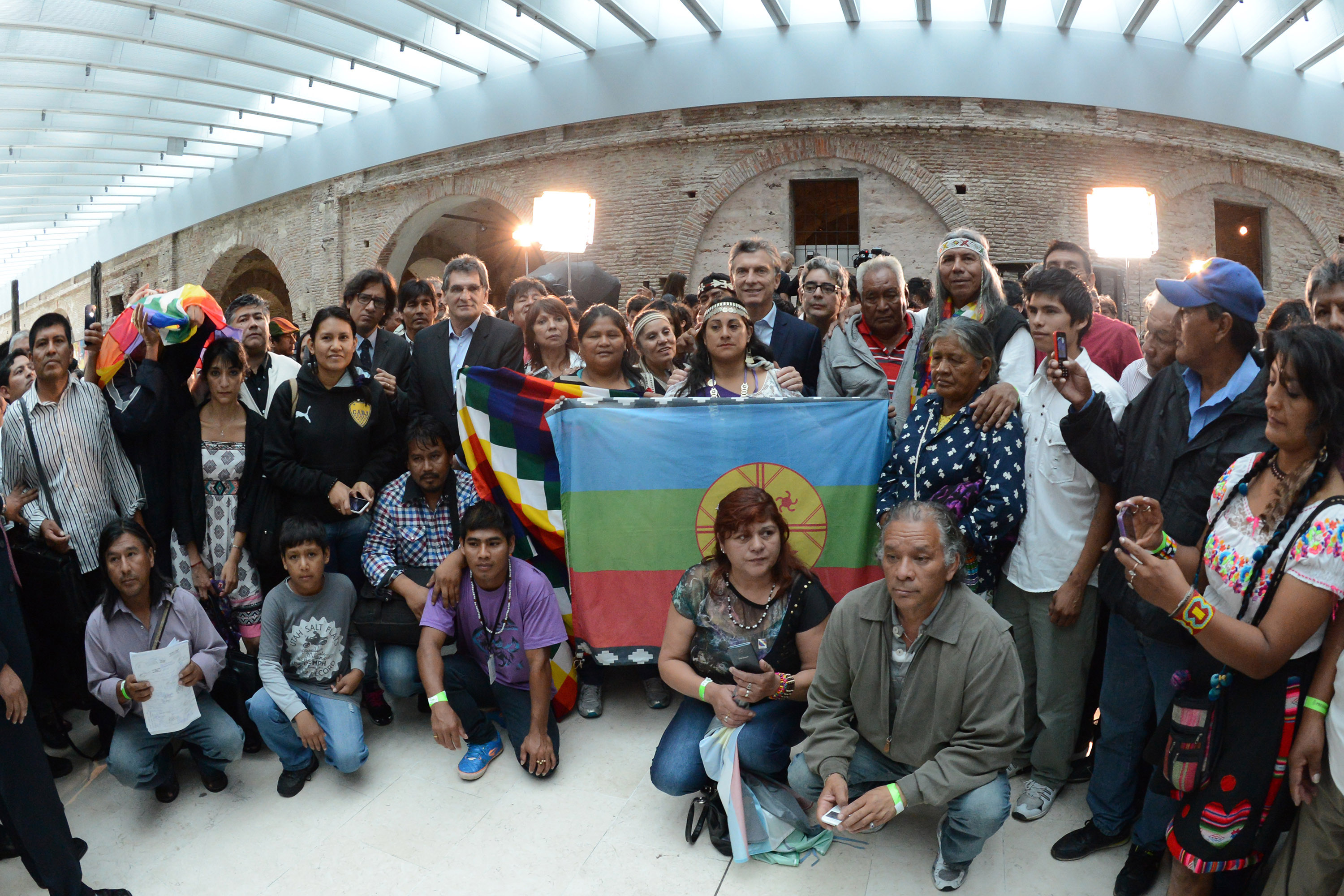 El presidente Mauricio Macri recibió a una delegación de un centenar de representantes de comunidades indígenas provenientes de 15 provincias, en el Museo del Bicentenario.